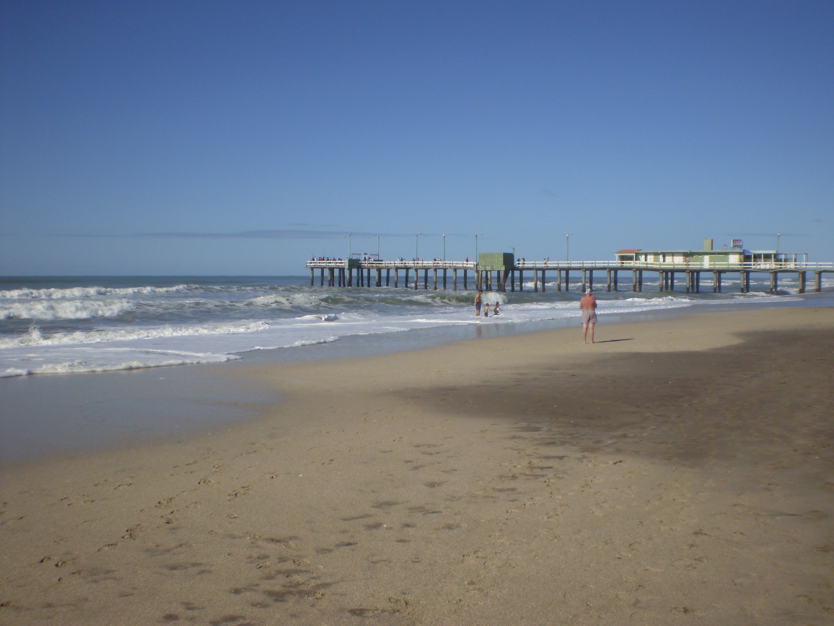 Pinamar, Argentina. Muelle de pescadores.